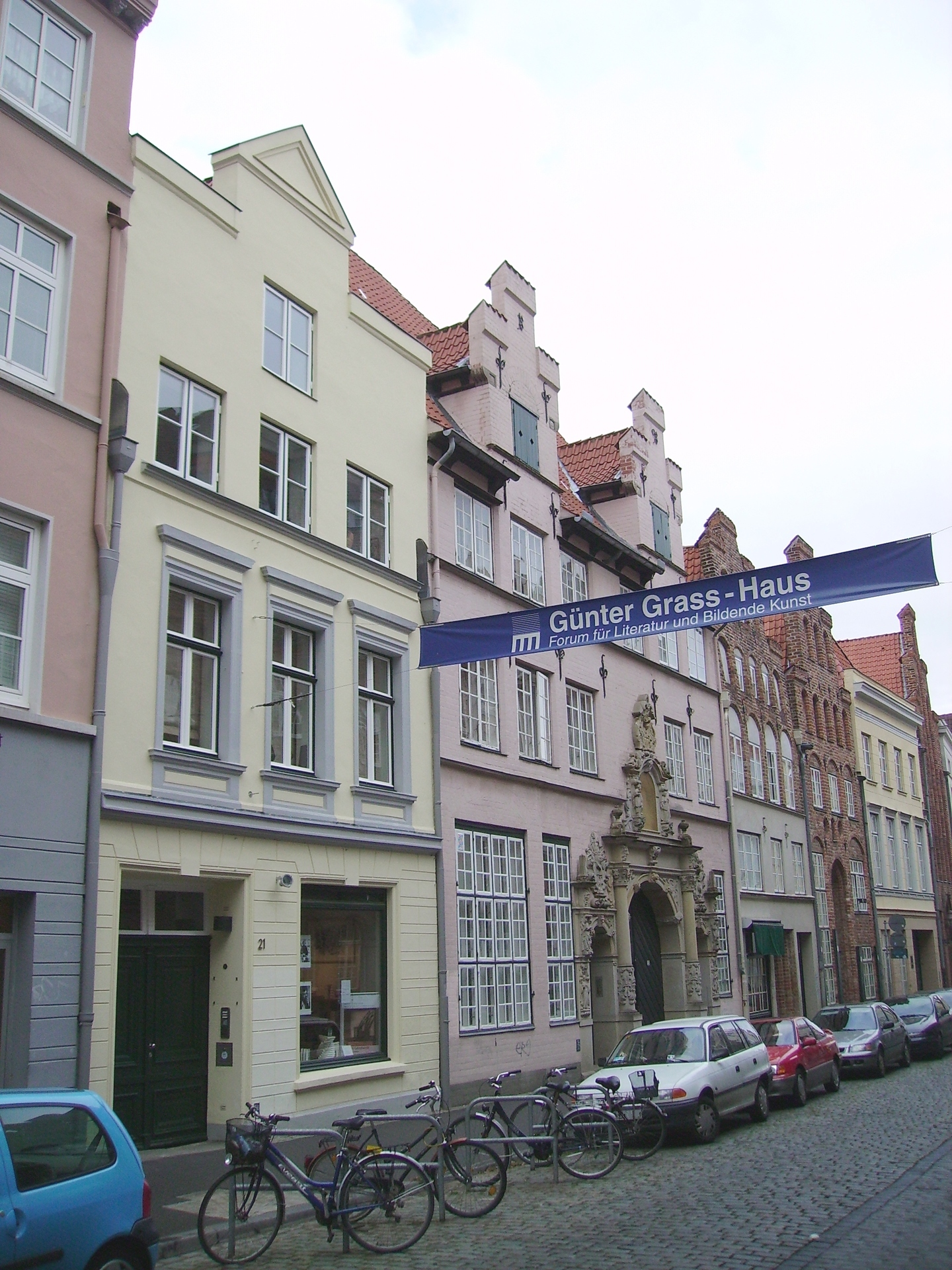 Das Günter-Grass-Haus (gelb) in der Glockengießerstraße 21 in Lübeck